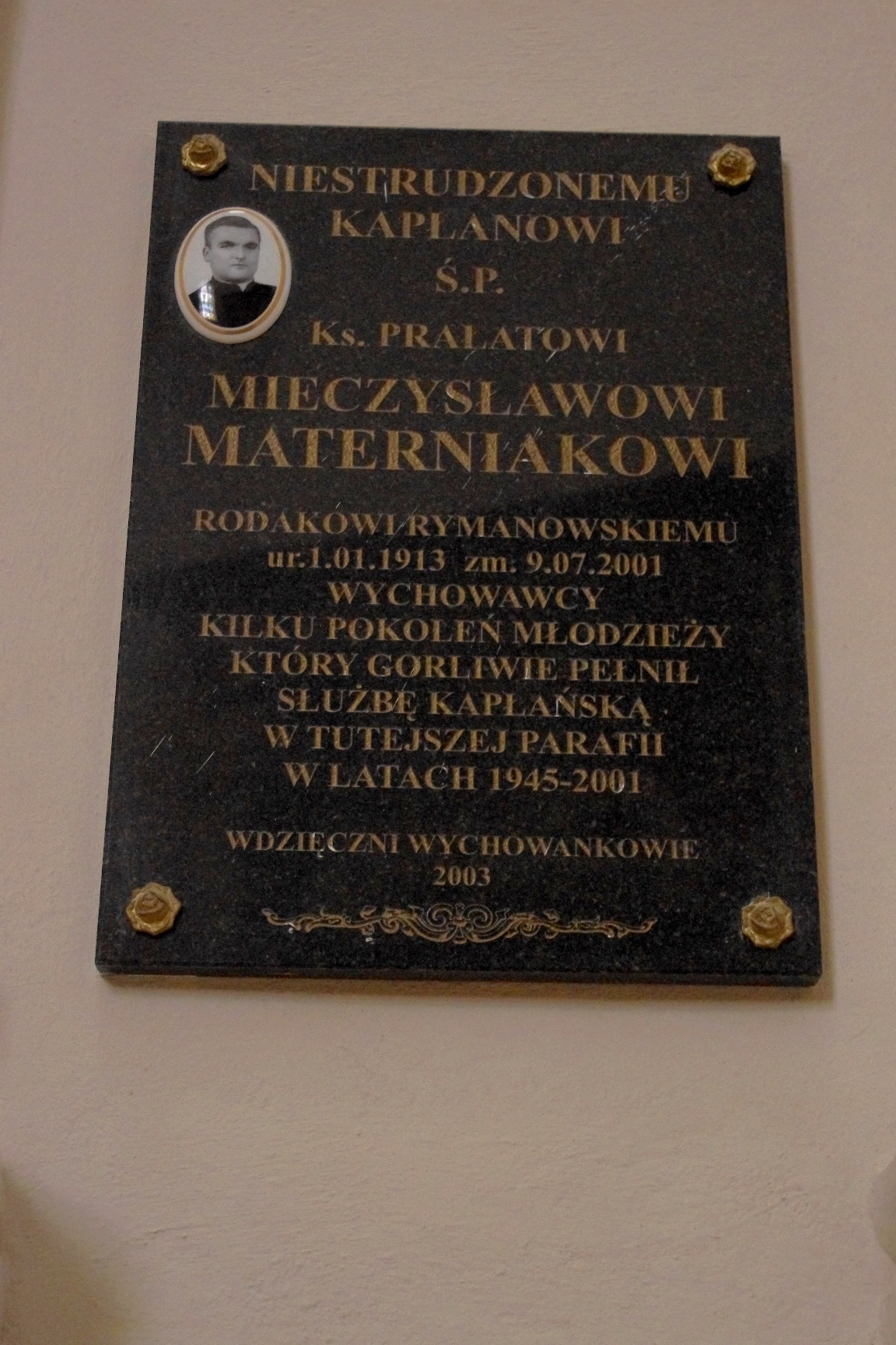 Tablica upamiętniająca ks. proboszcza Mieczysława Materniaka (1913-2001) w kościele św. Wawrzyńca w Rymanowie